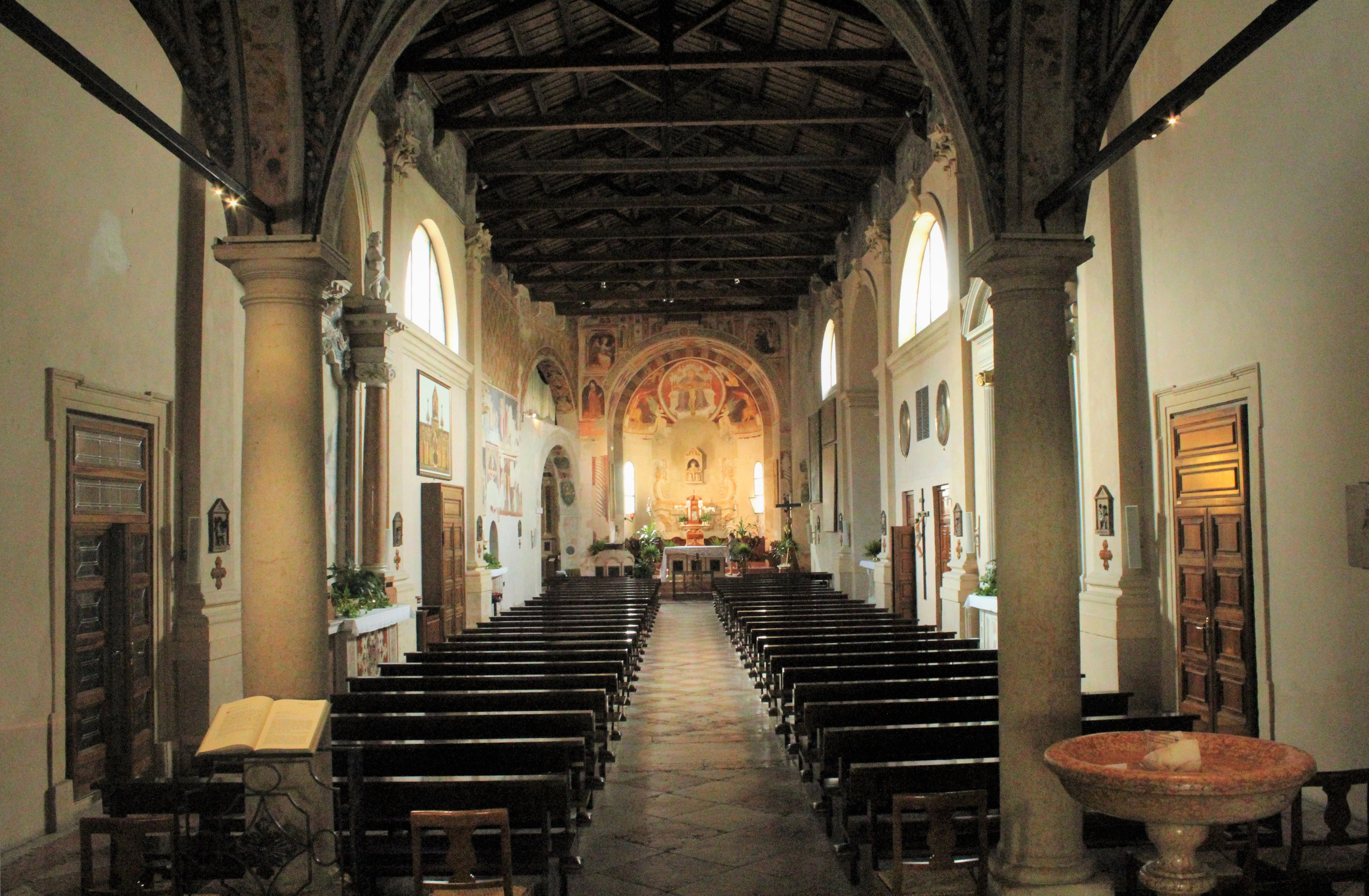 Chiesa della Santissima Trinità in Monte Oliveto a Verona - navata